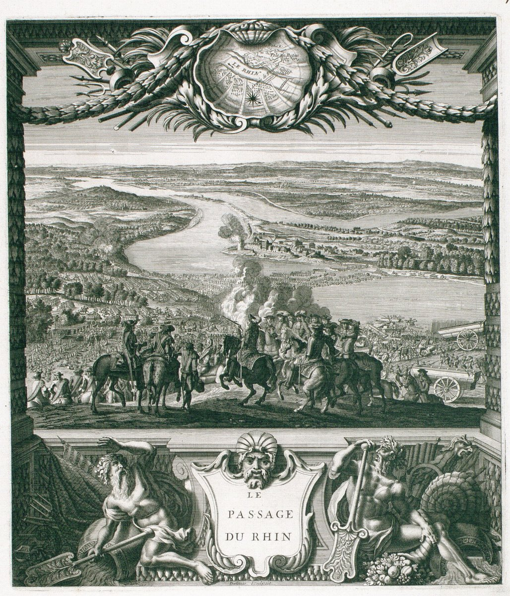 Abbildung der Rheinüberquerung durch die französische Armee 1672. Original titel: „Le passage du Rhin“, Kupferstich, 343x400 mm. Vermutlich aus: Le Clerc, Sebastian: Petite conquêtes de Louis Quatorze.